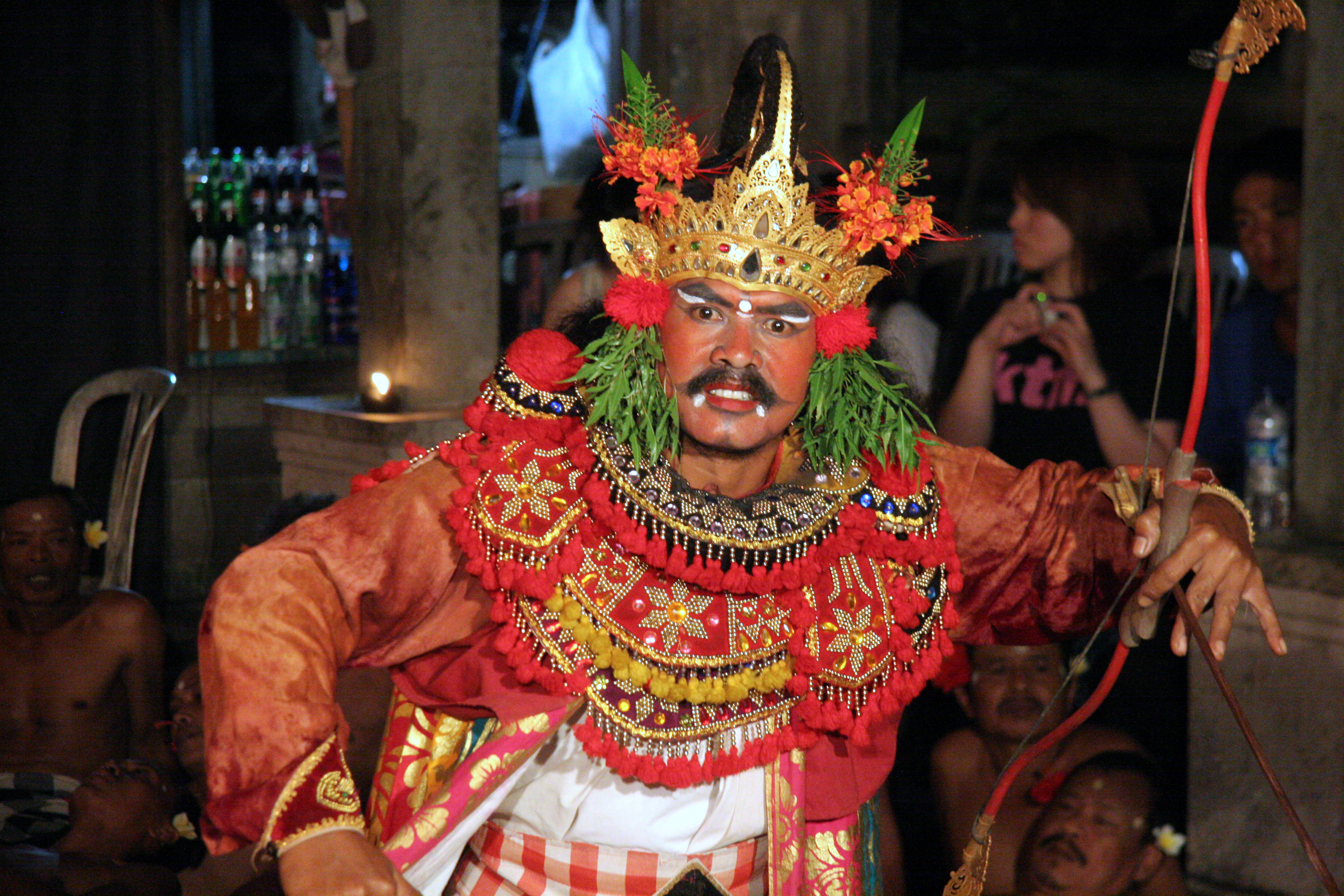 bali Ubud danseur de Kesak